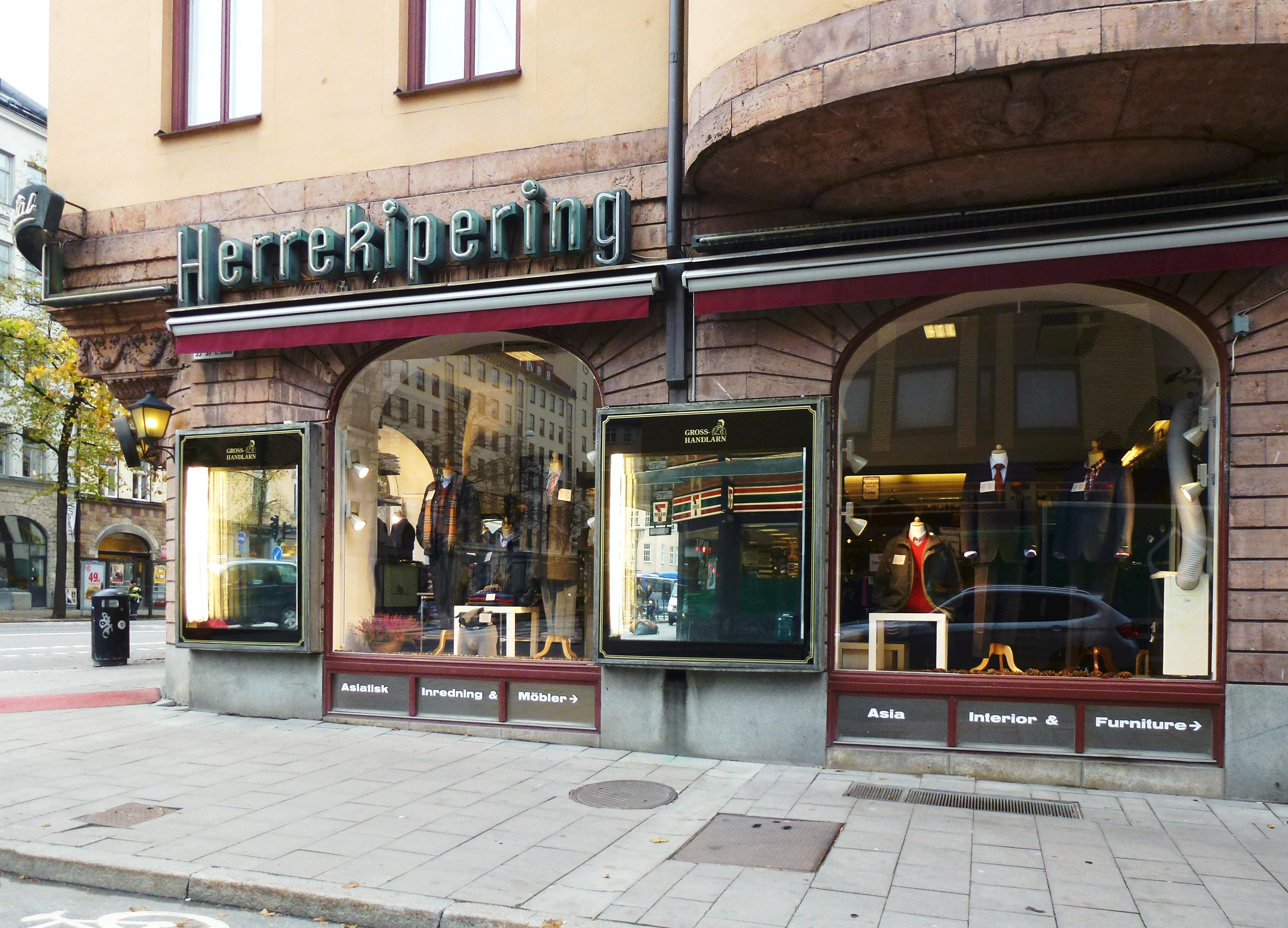 Continental Herrekipering, Odengatan 34 / Surbrunnsgatan 14